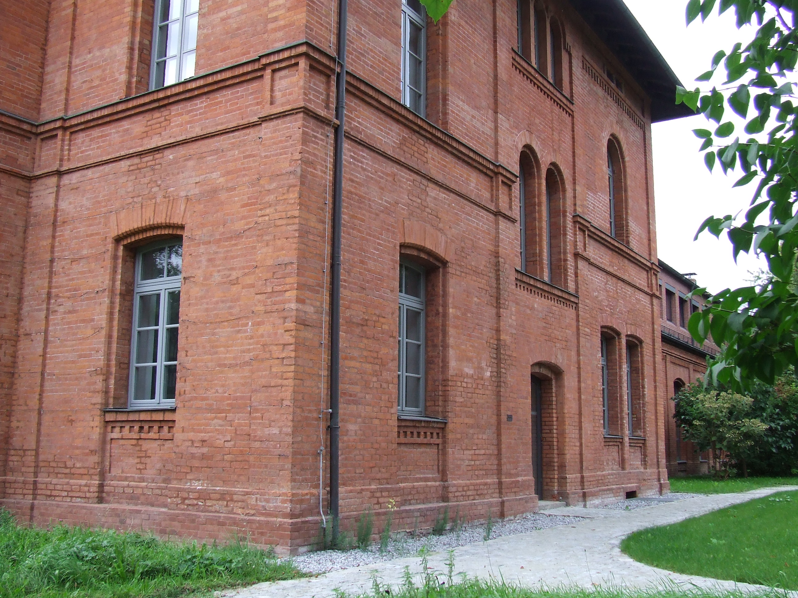 Ansicht von Südwesten